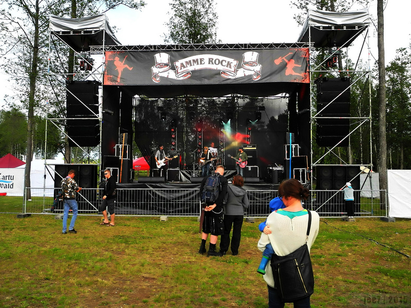 Amme Rock 2015 pealava. Esineb Six Feet Club